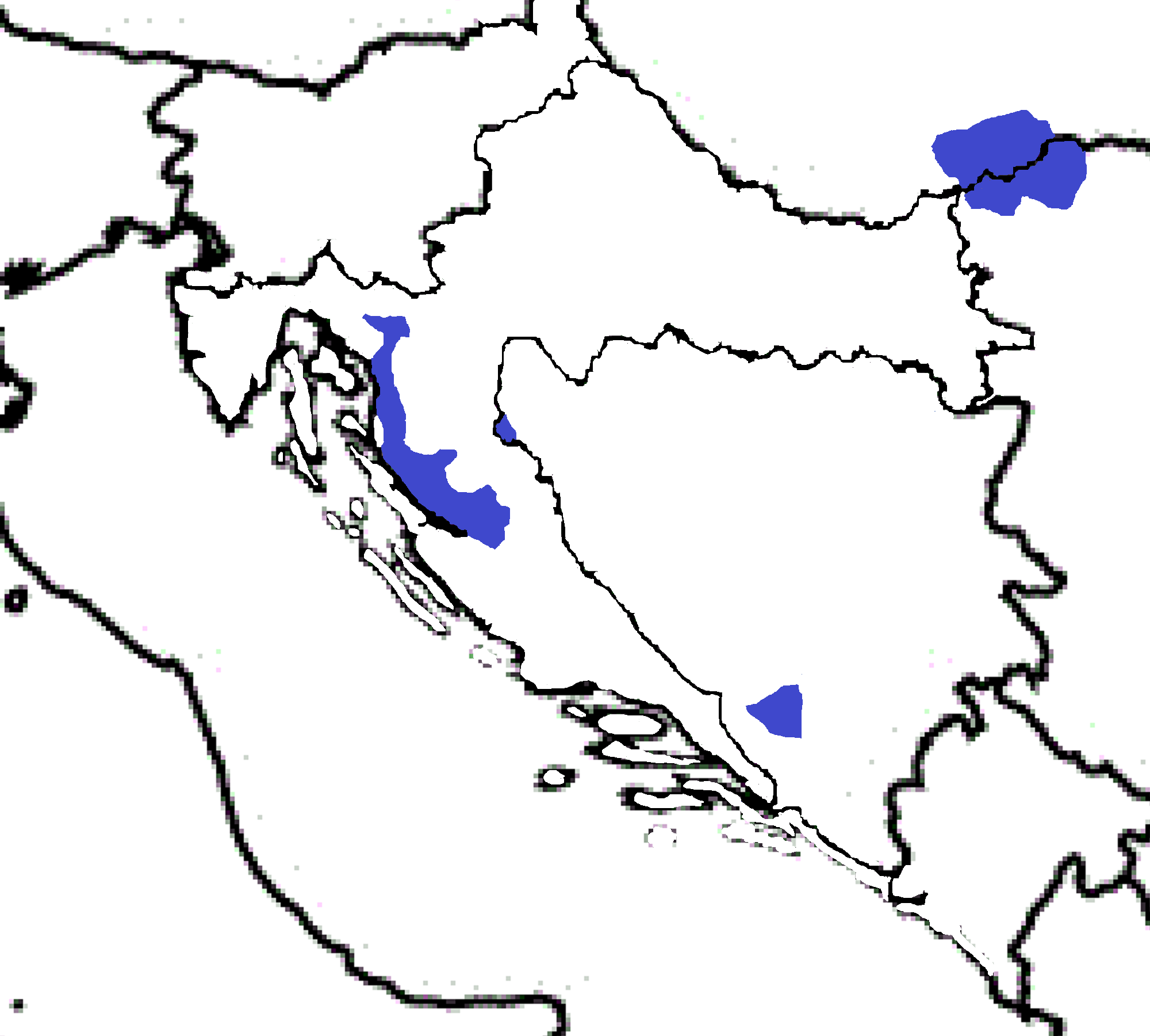 Migracije Bunjevaca sa sjevera zapadnohumskog dijalekta u Liku i Bačku.